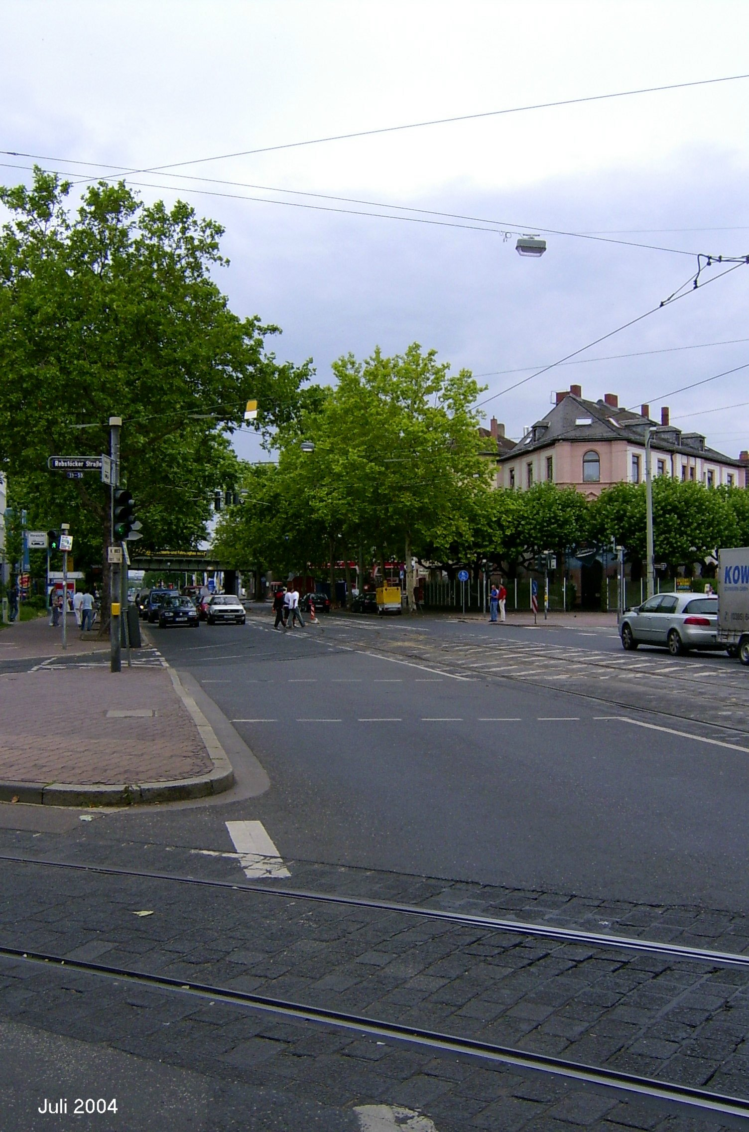 Mainzer Landstraße in Frankfurt am Main (Gallusviertel), Blickrichtung Westen.Die Aufnahme entstand an der Kreuzung Rebstöcker Straße